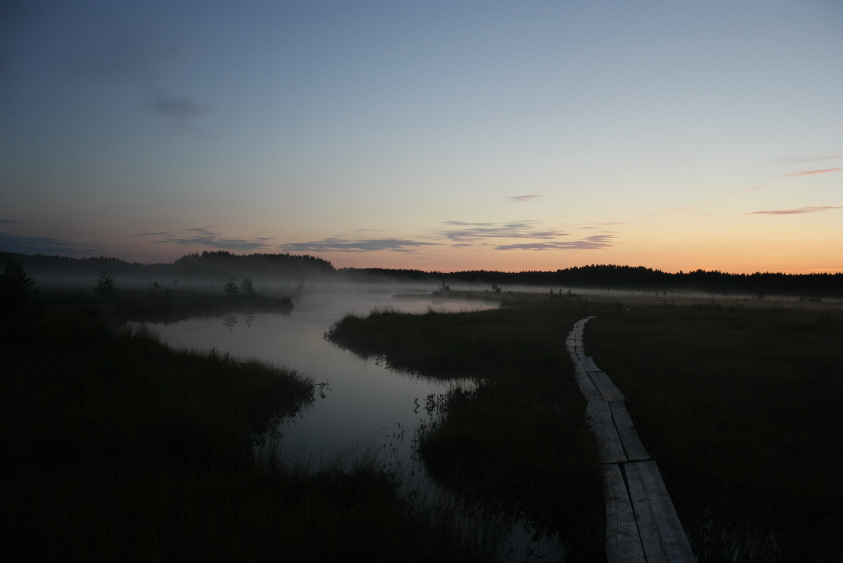 Muraka looduskaitseala, Rüütli soo, älves.